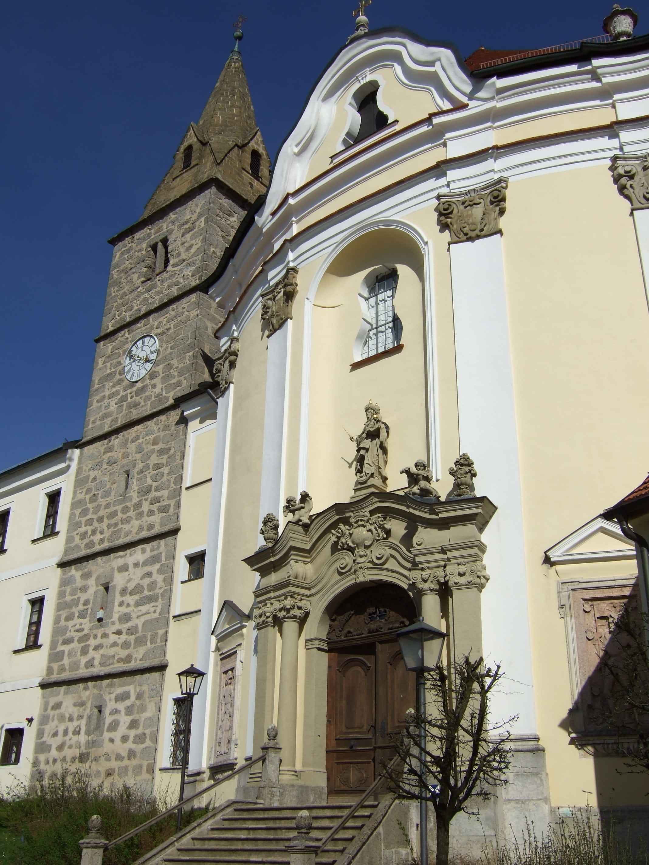 Klosterkirche des ehemaligen Benediktinerklosters Frauenzell im Bayerischen Wald